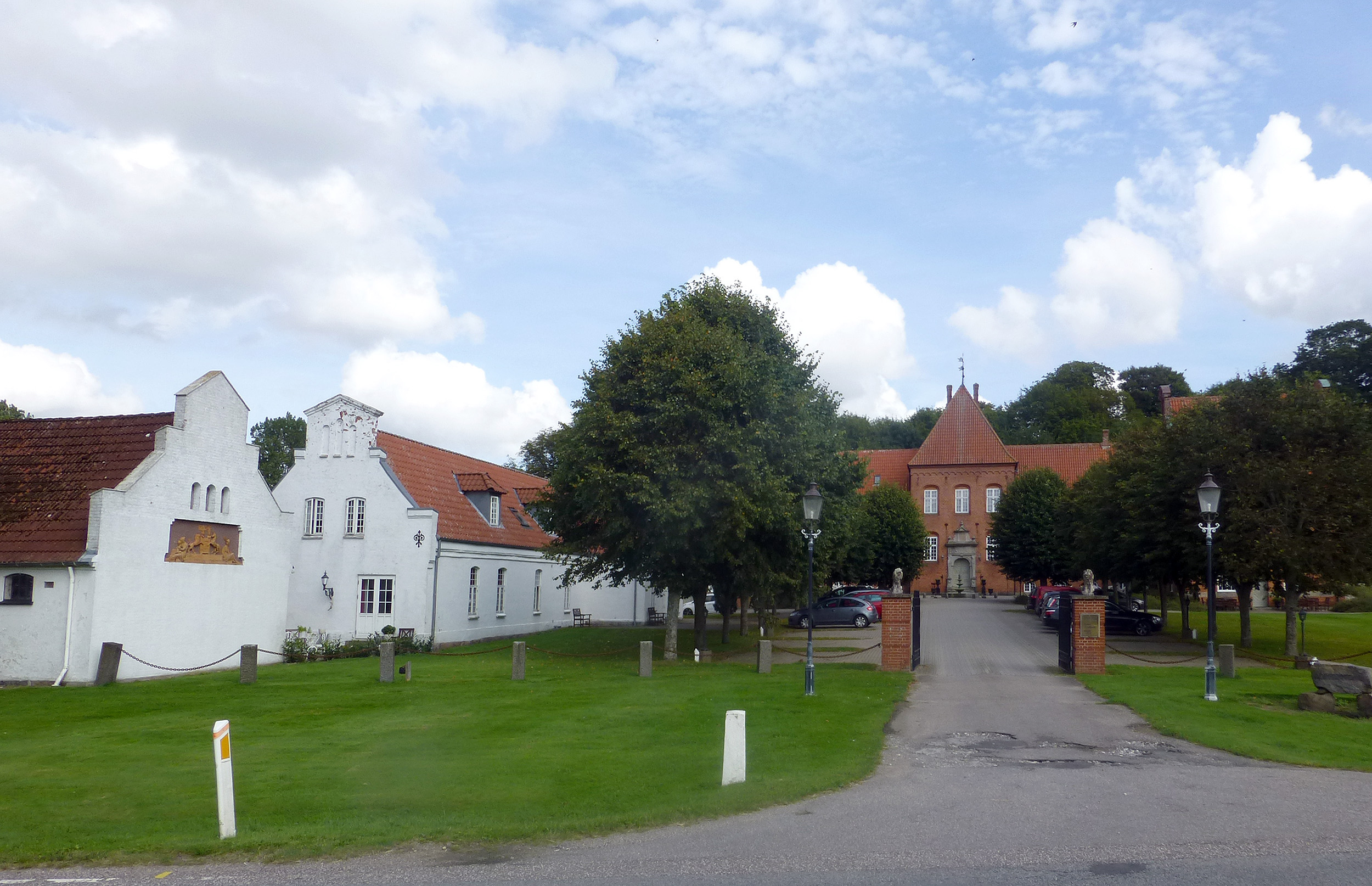 Sophiendal er en herregård i Veng Sogn i Skanderborg Kommune; set fra vest